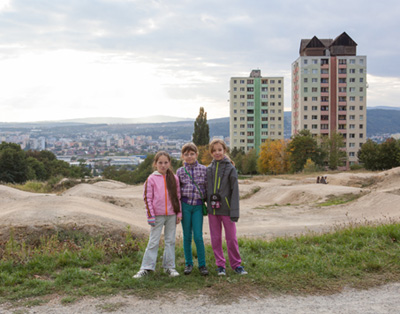 Tomáš Džadoň, Pamätník ľudovej architektúry, 2013- 2016, foto: Dominika Jackuliaková